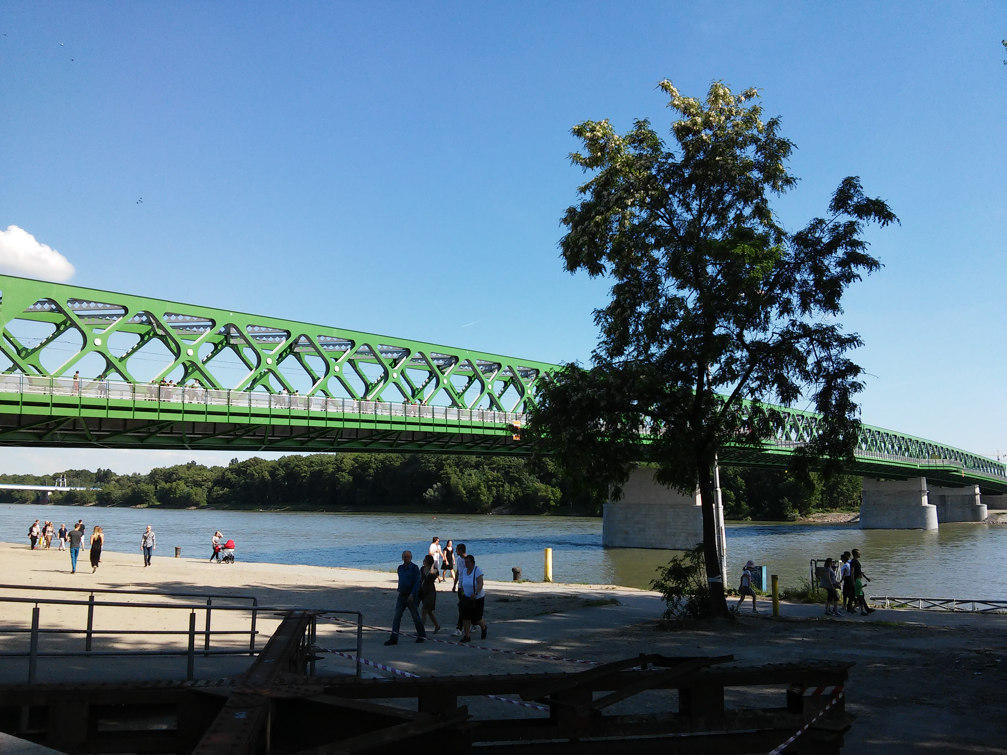 Starý most po úplnej rekonštrukcii